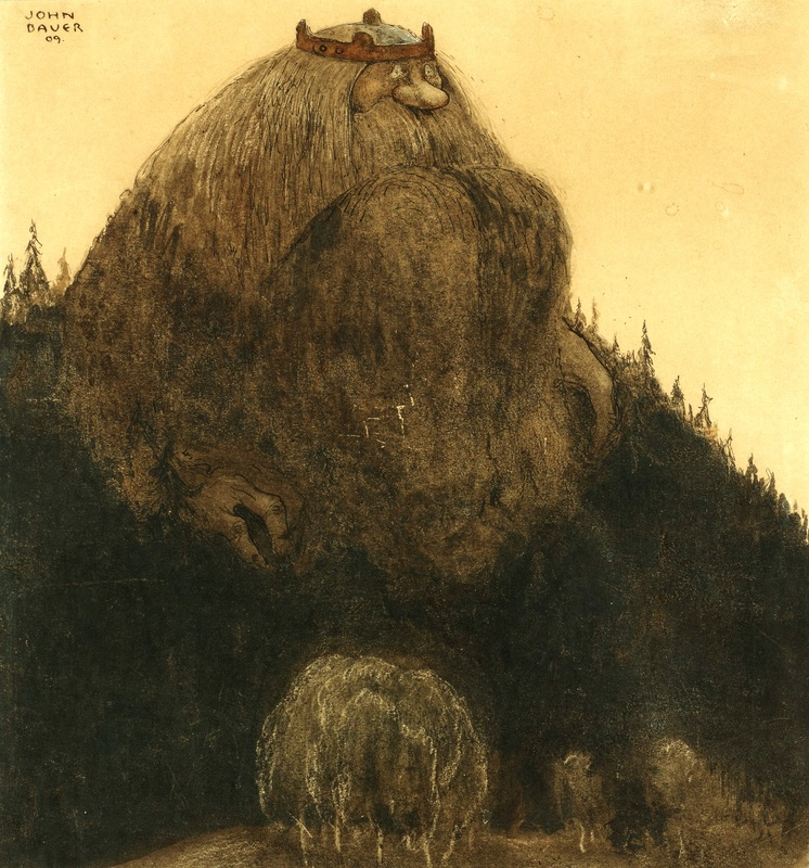 Le roi des collines, illustration de John Bauer, 1909